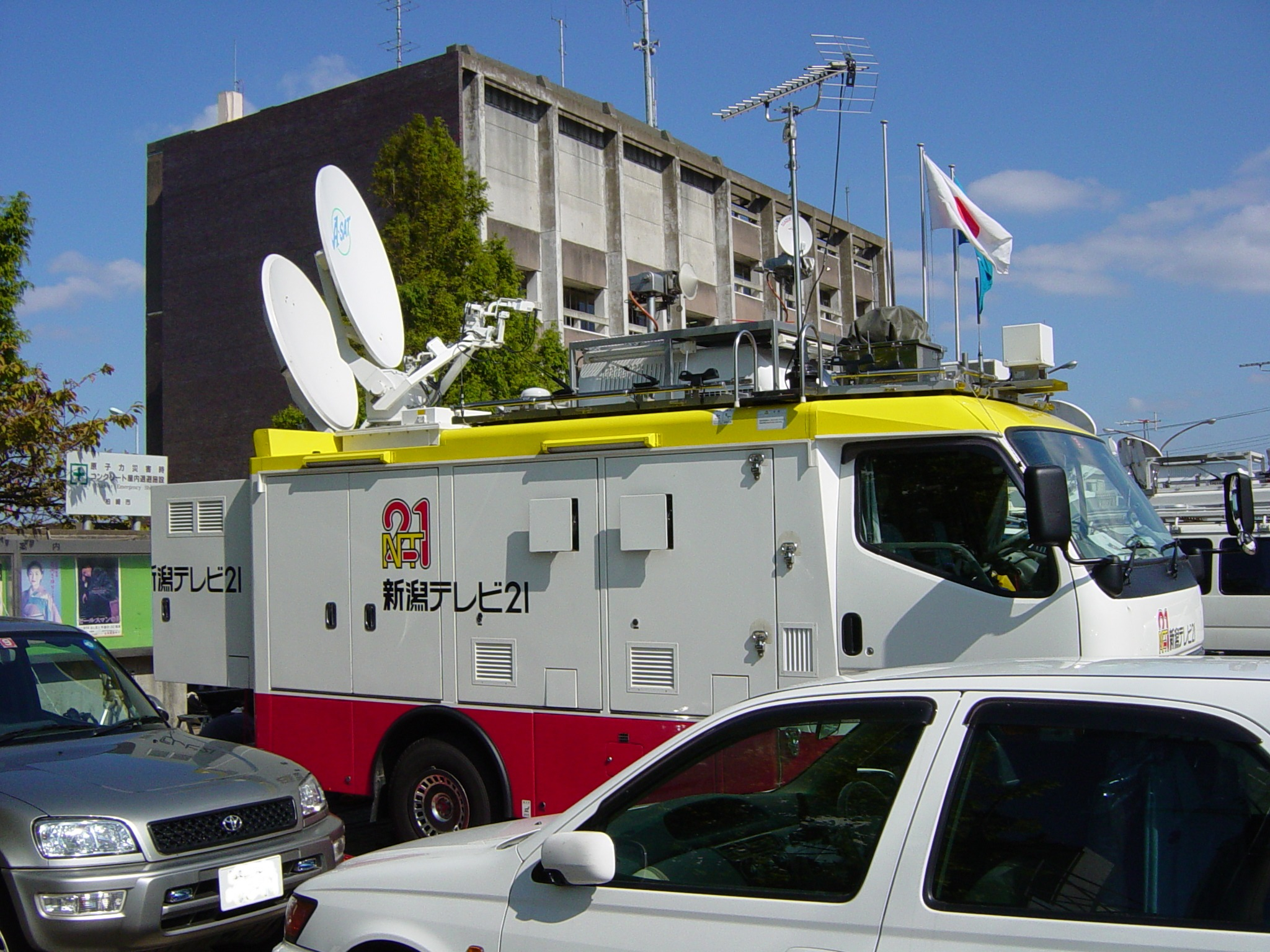 NT21拉致事件時取材風景（柏崎市）